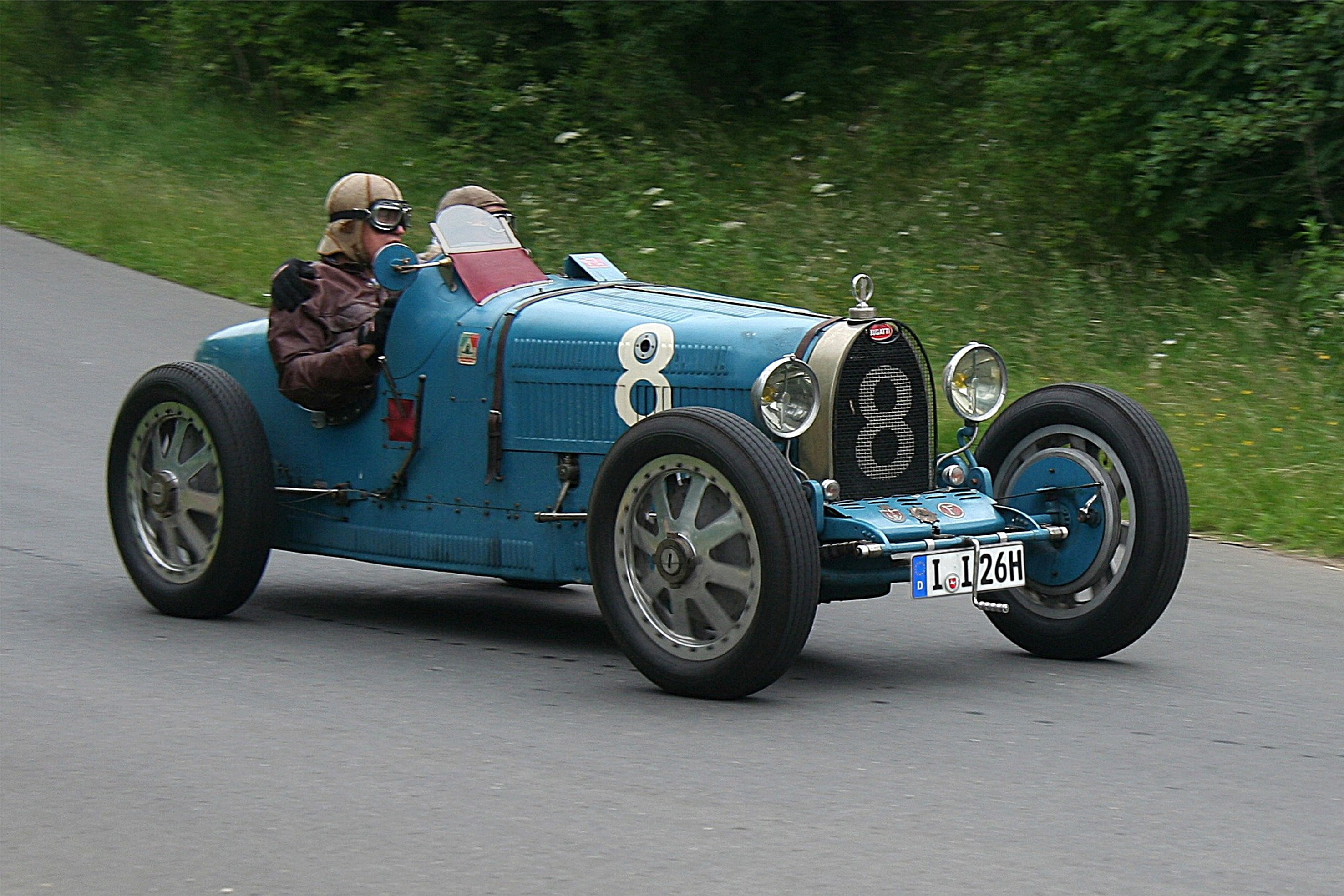 Bugatti Typ 35 B, Baujahr 1925, auf der alten Südschleife des Nürburgrings